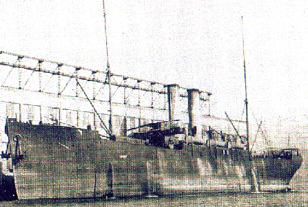 Transporte ARA Pampa